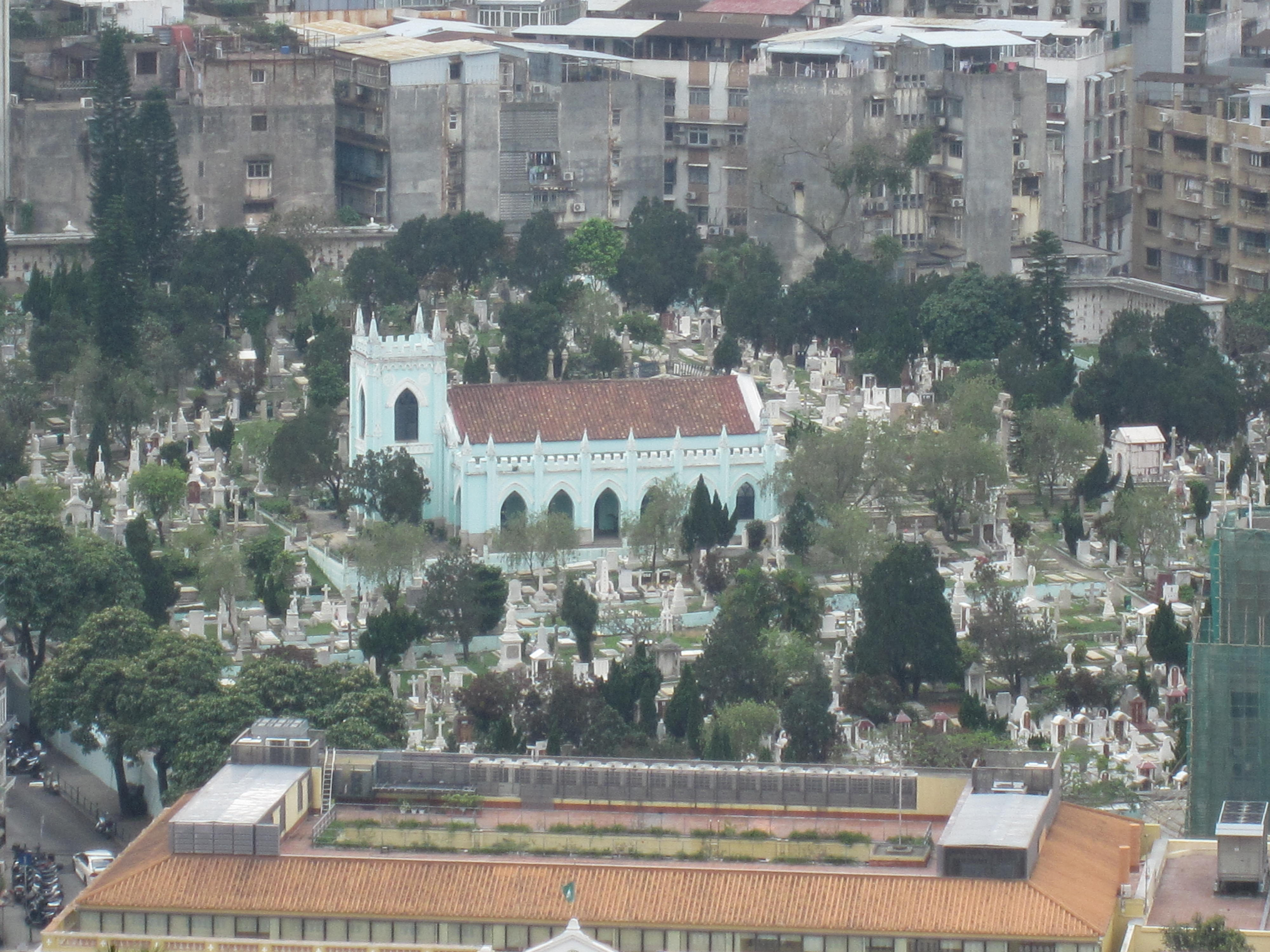 Cemitério São Miguel Arcanjo